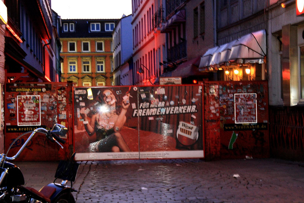 Herbertstraße in Hamburg